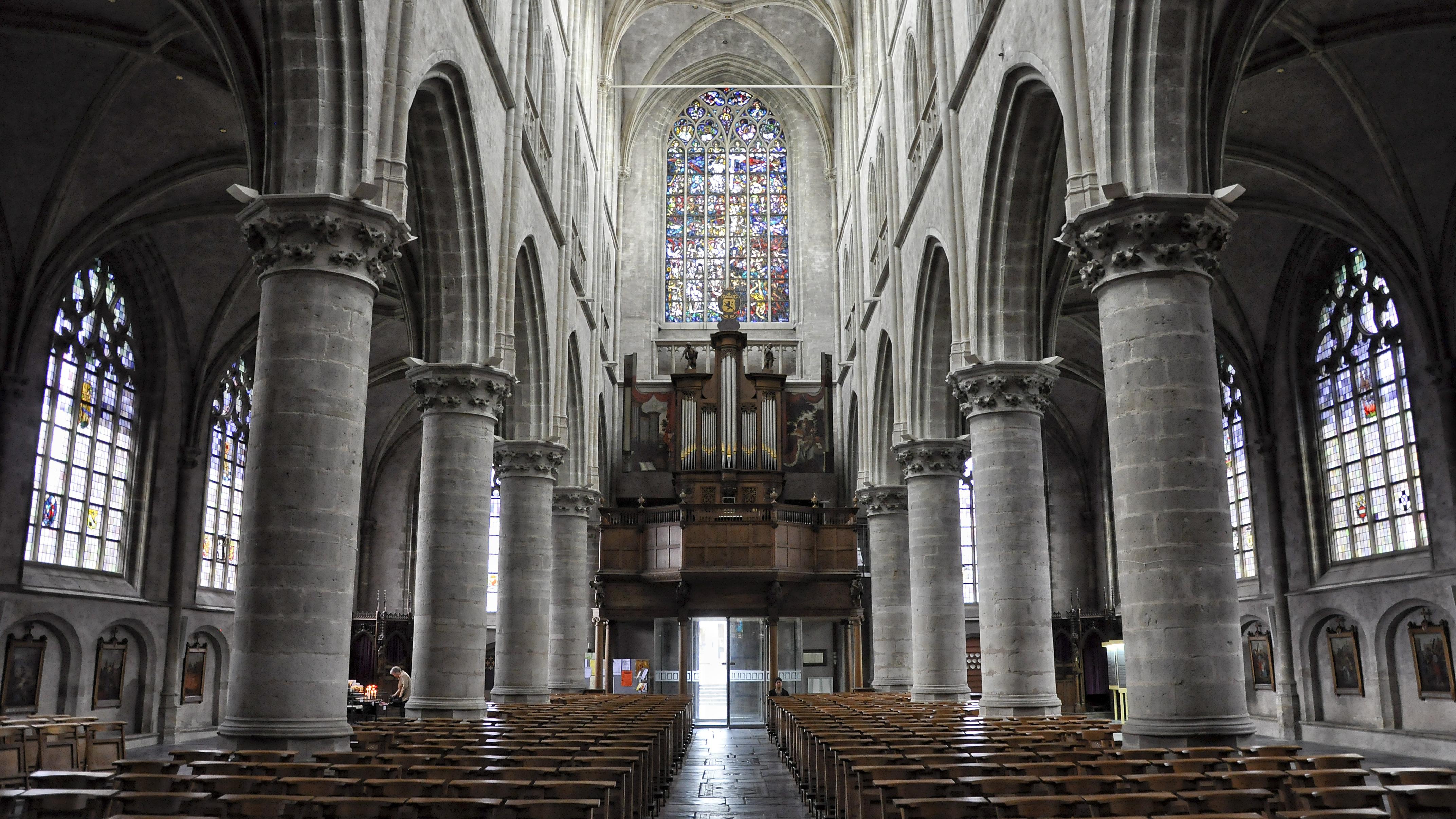 Het interieur met het orgel in de Sint-Willibrordusbasiliek te Hulst, Nederland